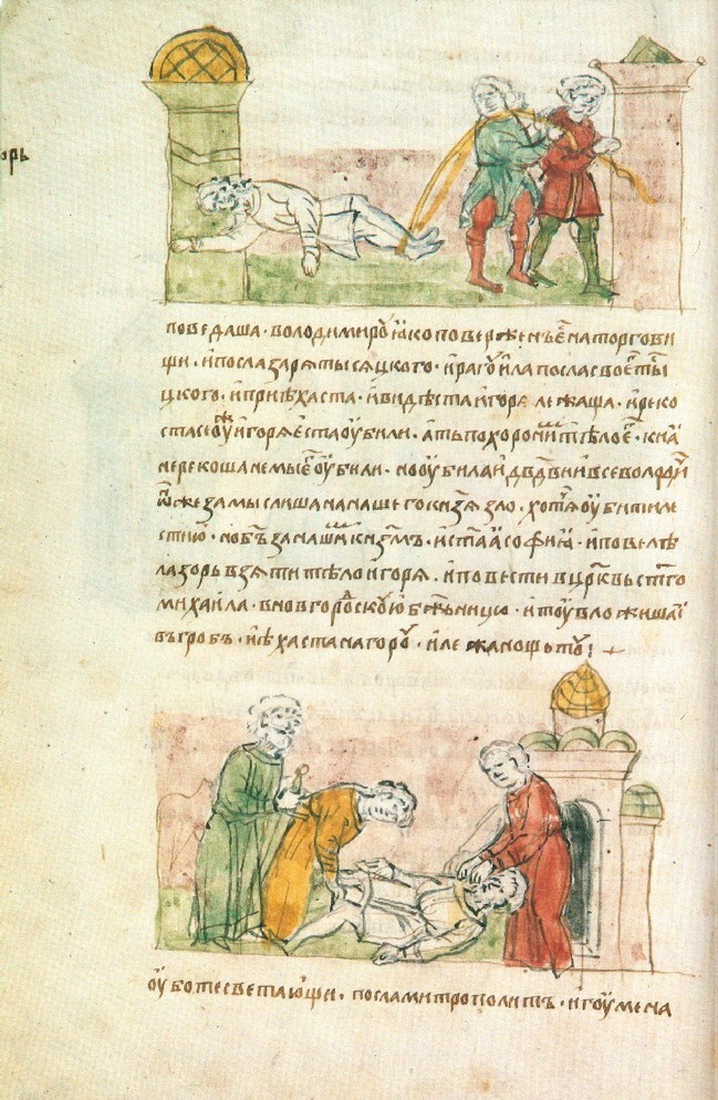 Радзивилловская (Кёнигсбергская) летопись.